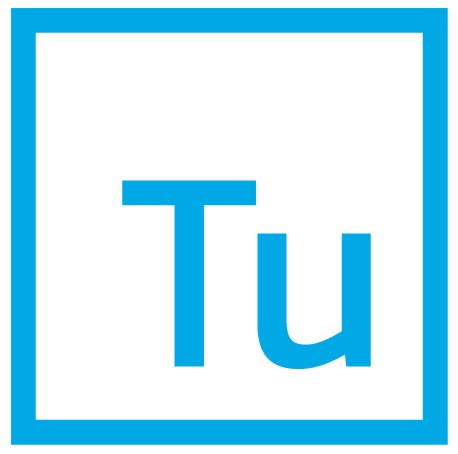 Turiba University logo